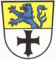 Wappen des ehemaligen Landkreises Soltau